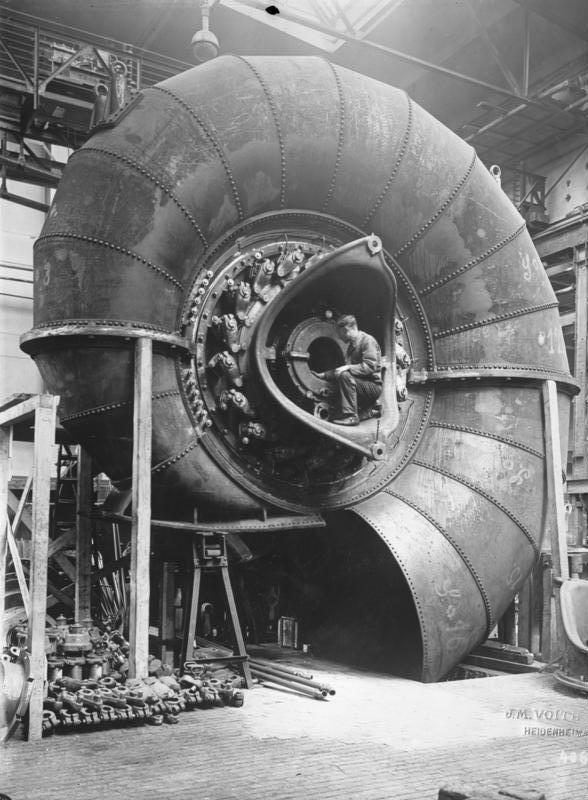 Riesen deutscher Technik! Die deutsche Industrie arbeitet zurzeit an gewaltigen Riesenwerken, welche vorwiegend für die deutsche Wirtschaft wie die des Auslandes, bestimmt sind. Das Jahr 1928 verspricht ein bahnbrechendes Jahr deutscher Technik zu werden. Keine Riesen-Schnecke, sondern das Gehäuse einer Voith'schen Spiralturbine für das Wasserkraftwerk Channon in Irland. Der Durchmesser des Gehäuses beträgt 5,4 m. Information added by Wikimedia users.Alter Titel: Riesen deutscher Technik! Wie eine Riesen-Schnecke mutet die Voith'sche Spiralturbine für eine Leistung von 9.000 P.S. an. Dieses Wunderwerk ist für ein Kraftwerk in Norwegen bestimmt.